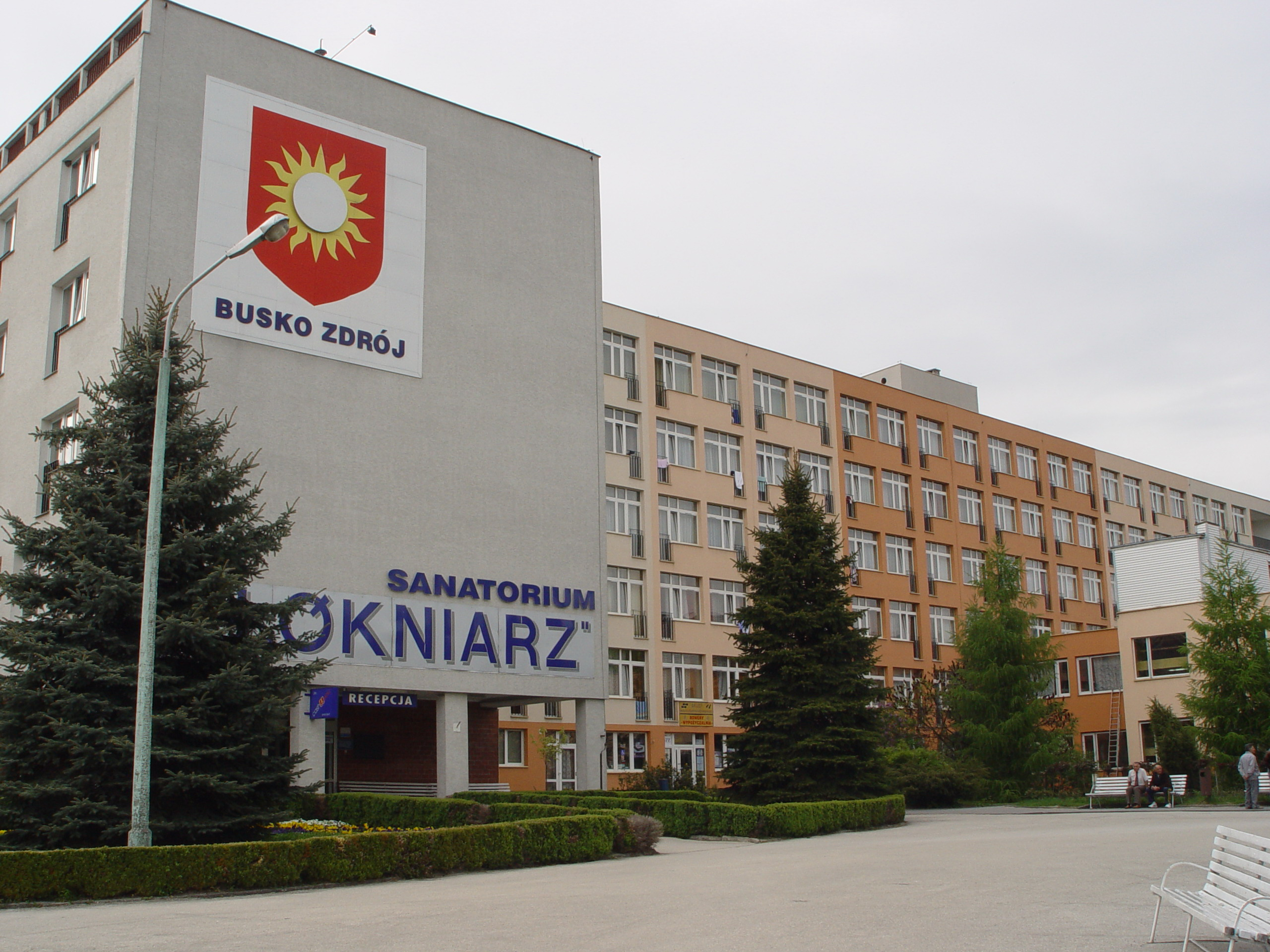 Busko-Zdrój, Sanatorium Włókniarz-elewacja wschodnia, wejście główne